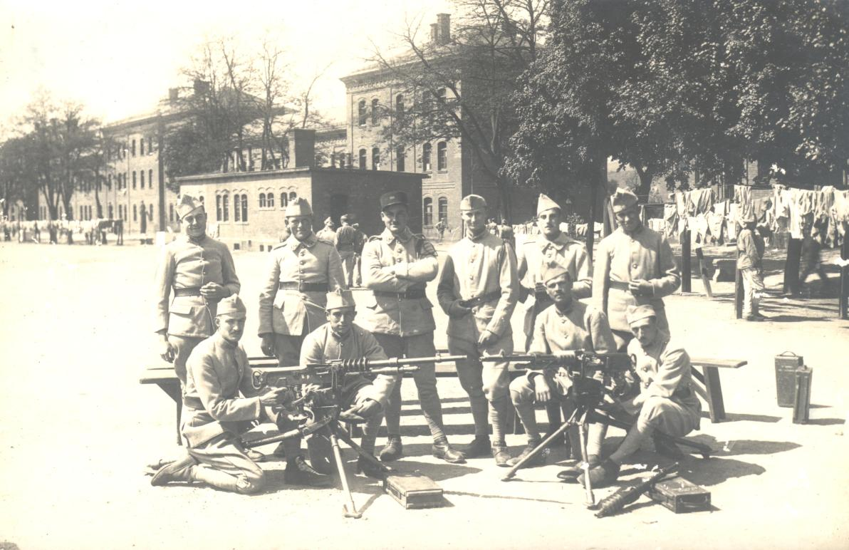 un groupe de mitailleurs du 156 R.I en 1913.